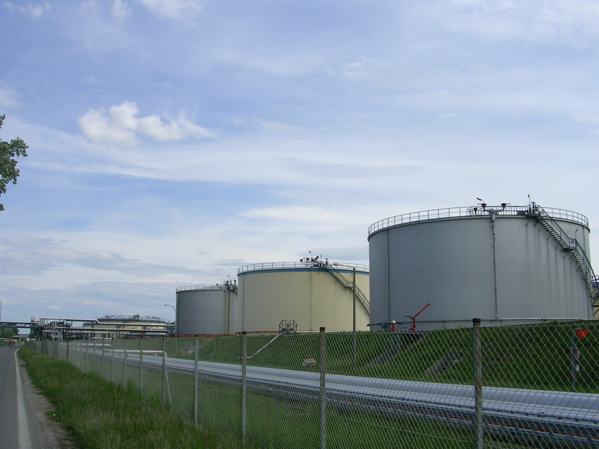 Ölhafen in Wien Donaustadt